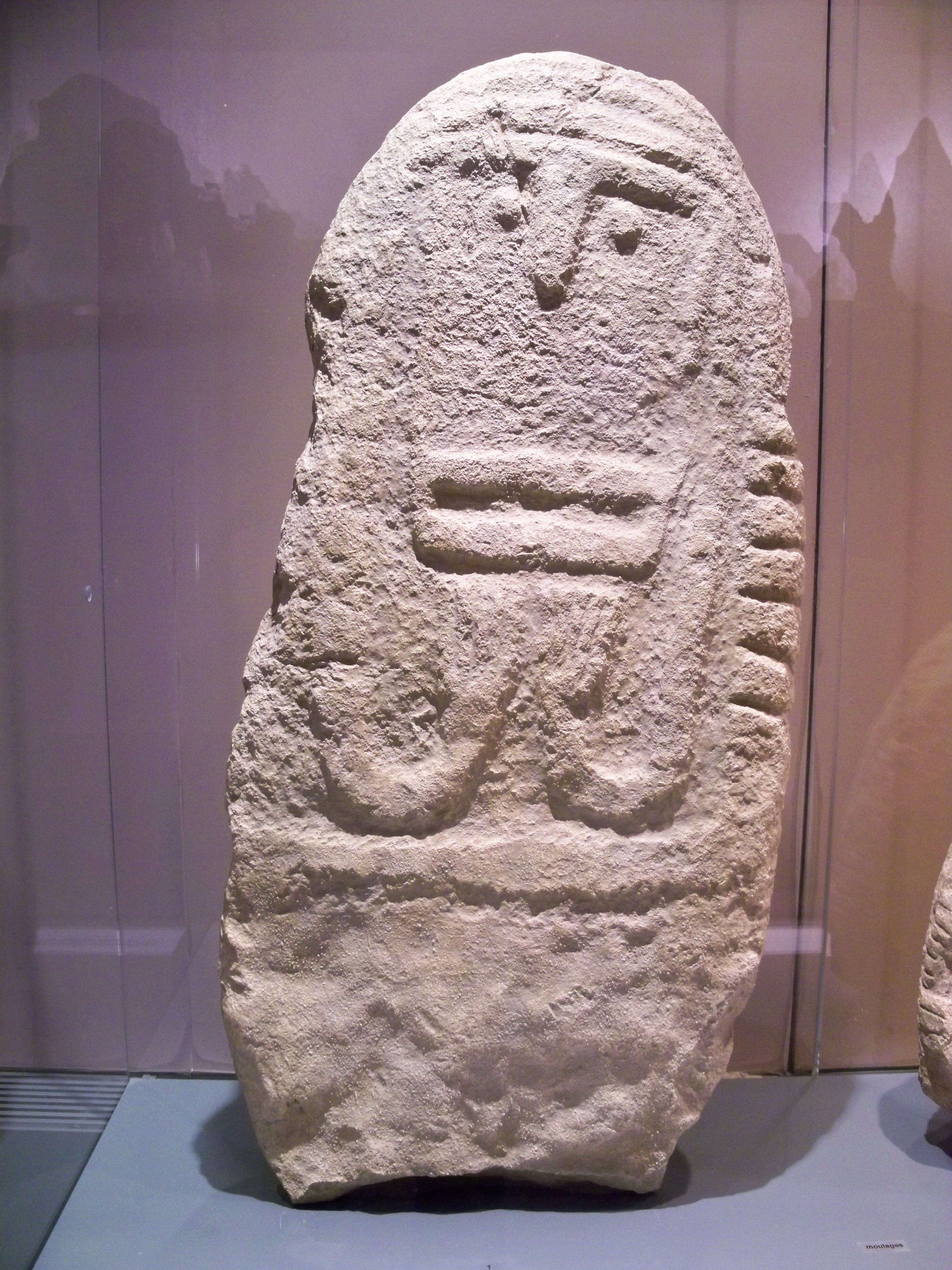 Stèle néolithique au musée préhistoriques de Quinson (04)